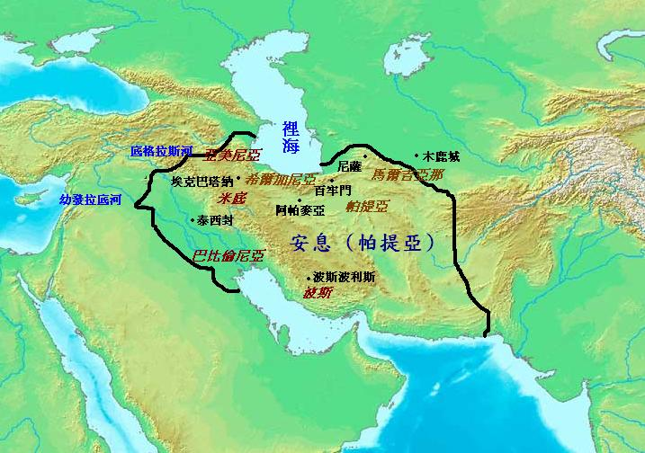 公元一世紀的安息。